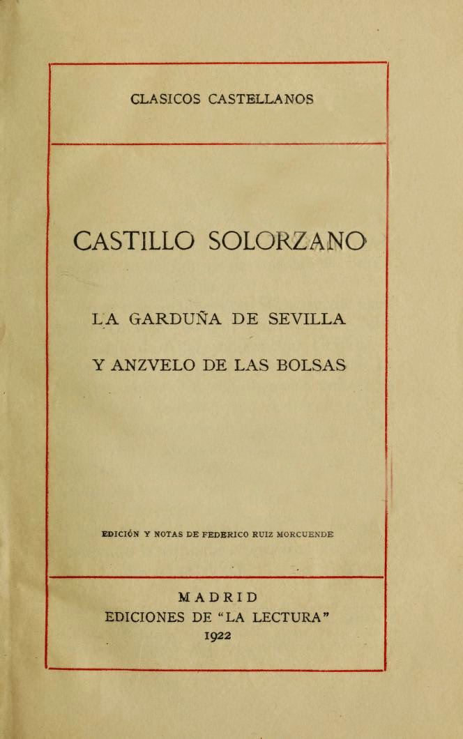 Clásicos Castellanos. La garduña de Sevilla y anzvelo de las bolsas, Castillo Solorzano.